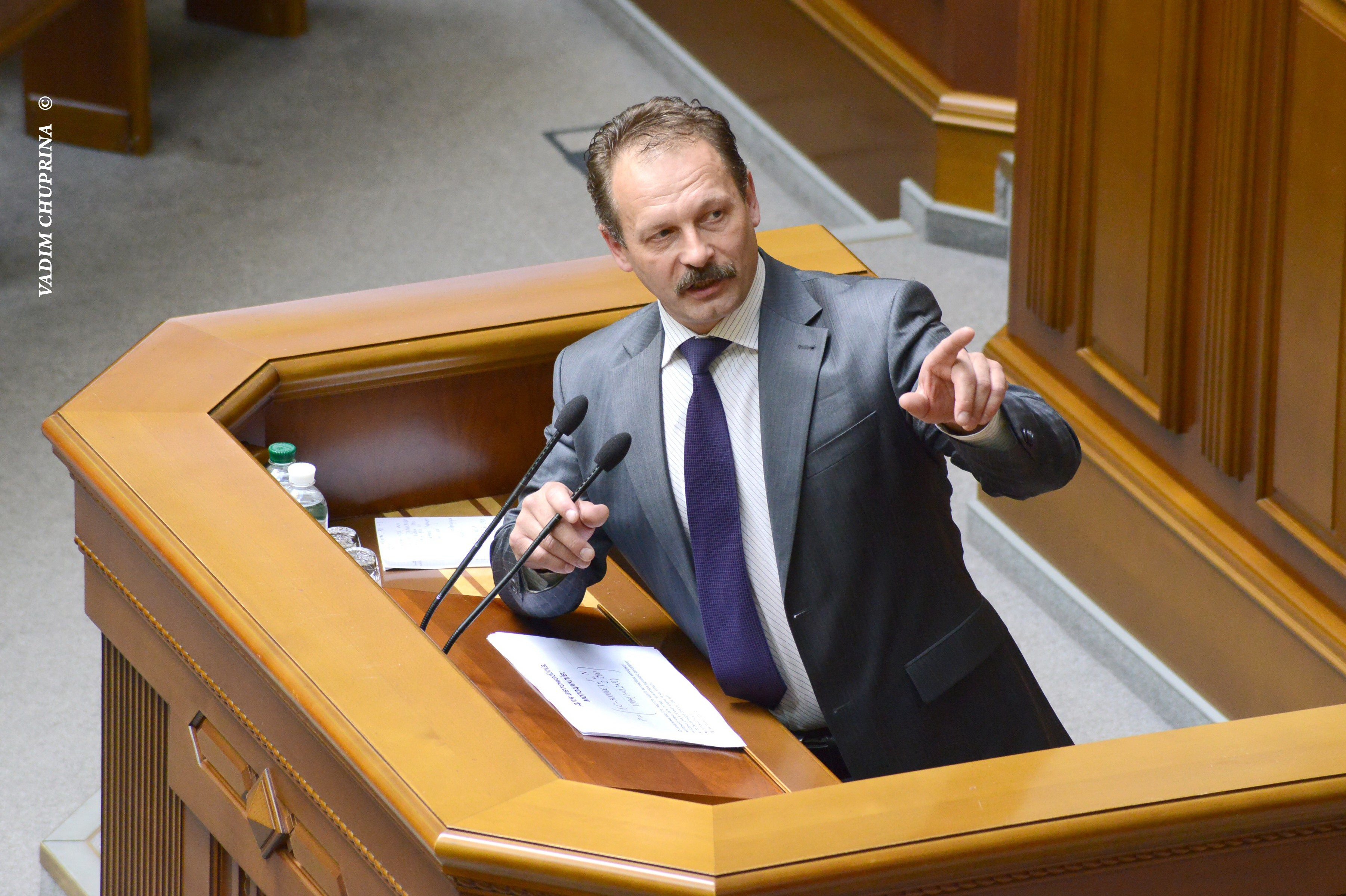 ВЕРХОВНА РАДА УКРАЇНИ 2015 фотограф Вадим Чуприна